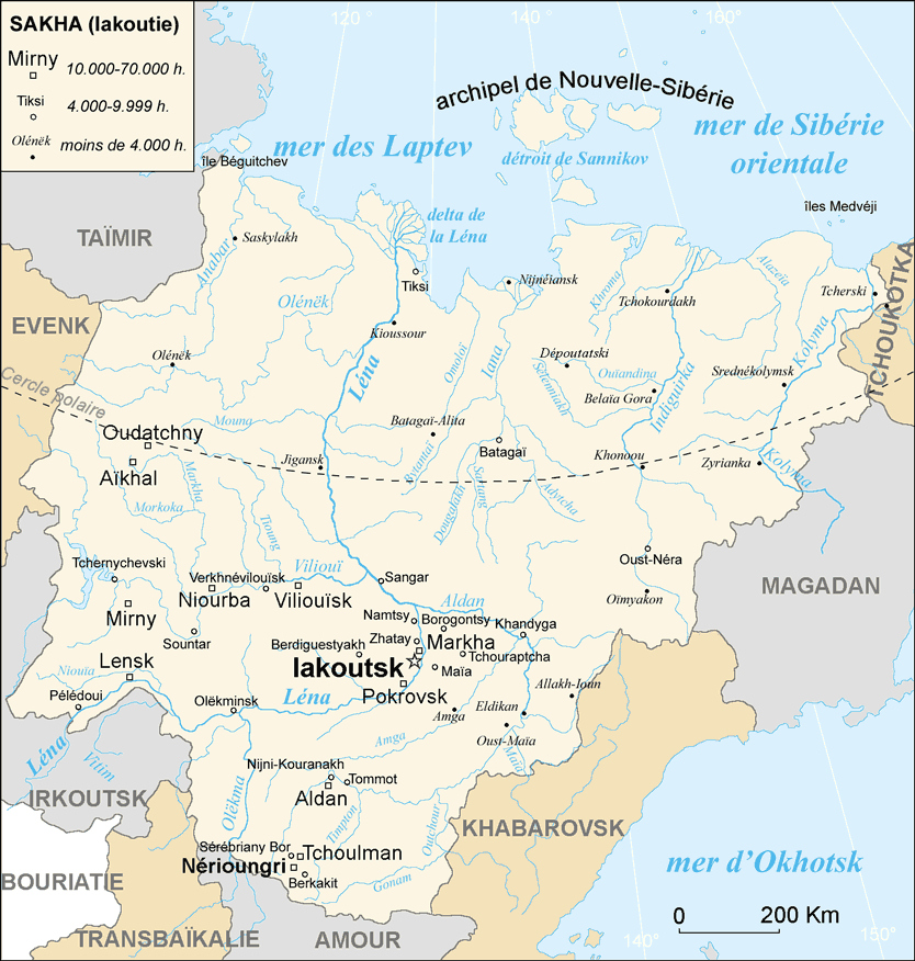 Carte de la république de Sakha (Iakoutie), Russie